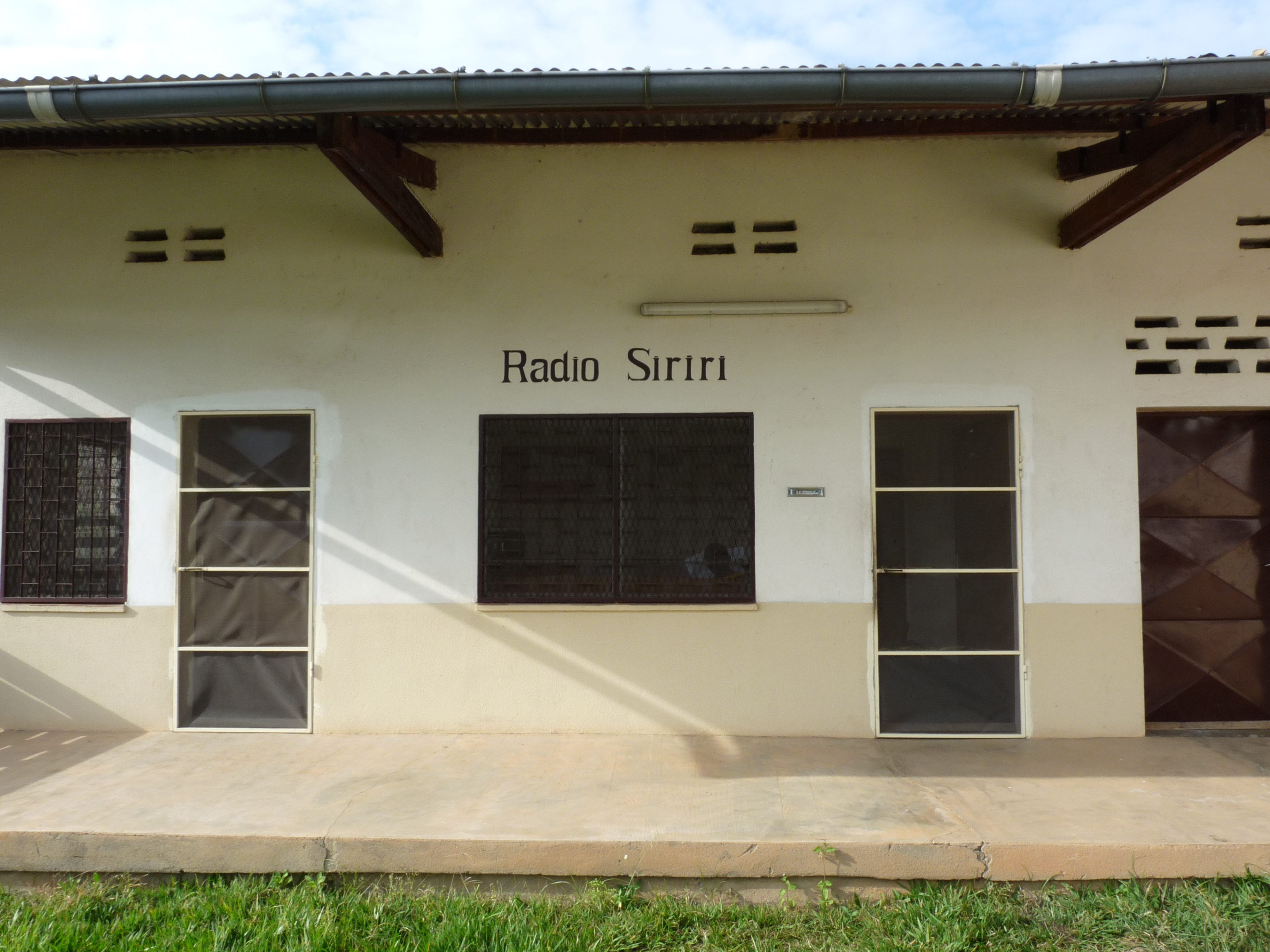 Radio Siriri, Bouar, Centrafrique.